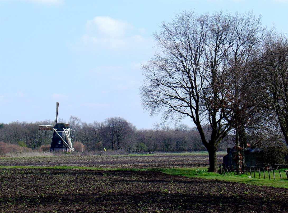 De molen Zaandplatte in Engeland bij Ruinen (gemeente De Wolden)